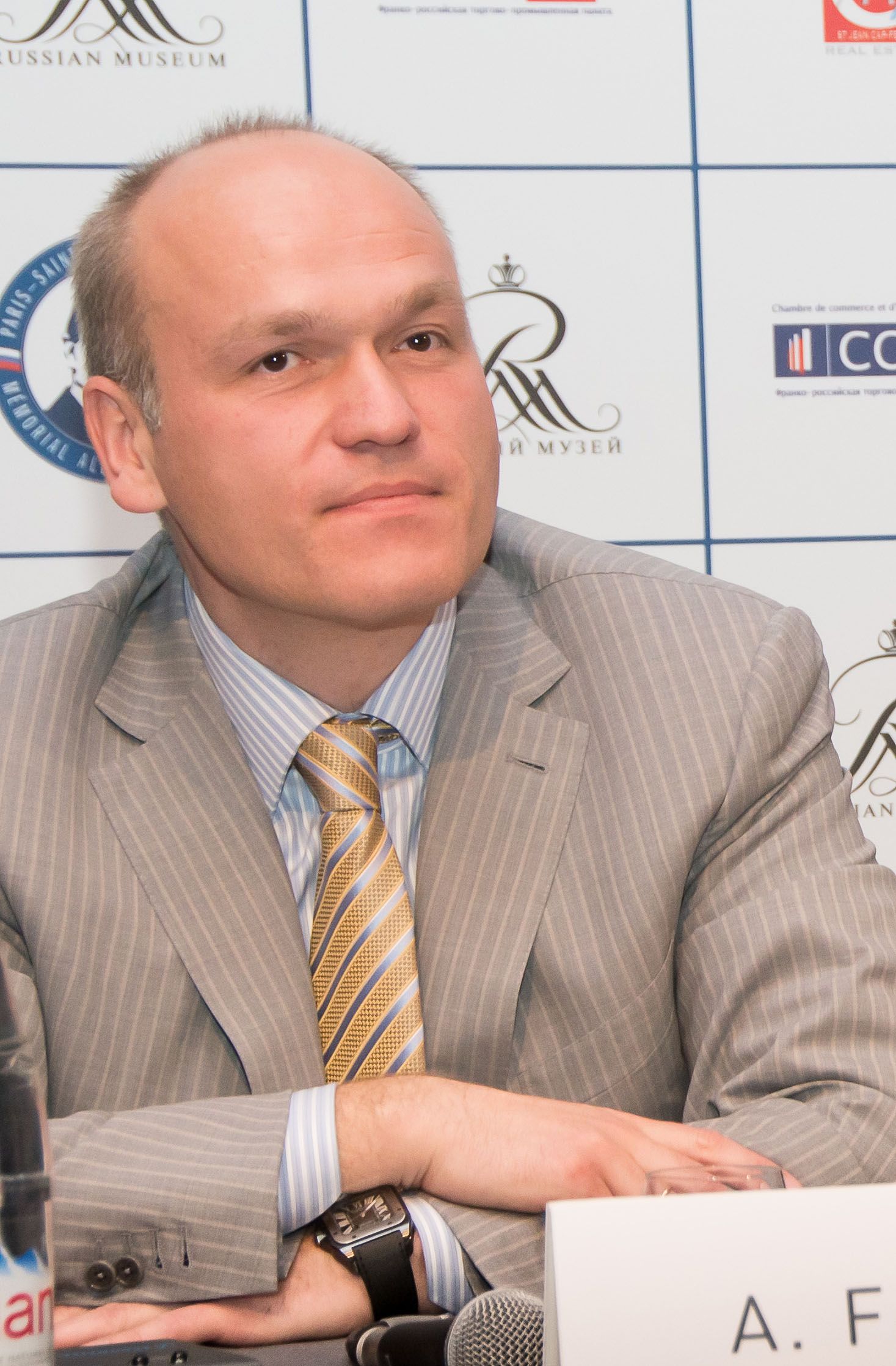 Филатов Андрей Васильевич, 20 апреля 2013 года – на церемонии официального открытия турнира «Мемориал Алехина»